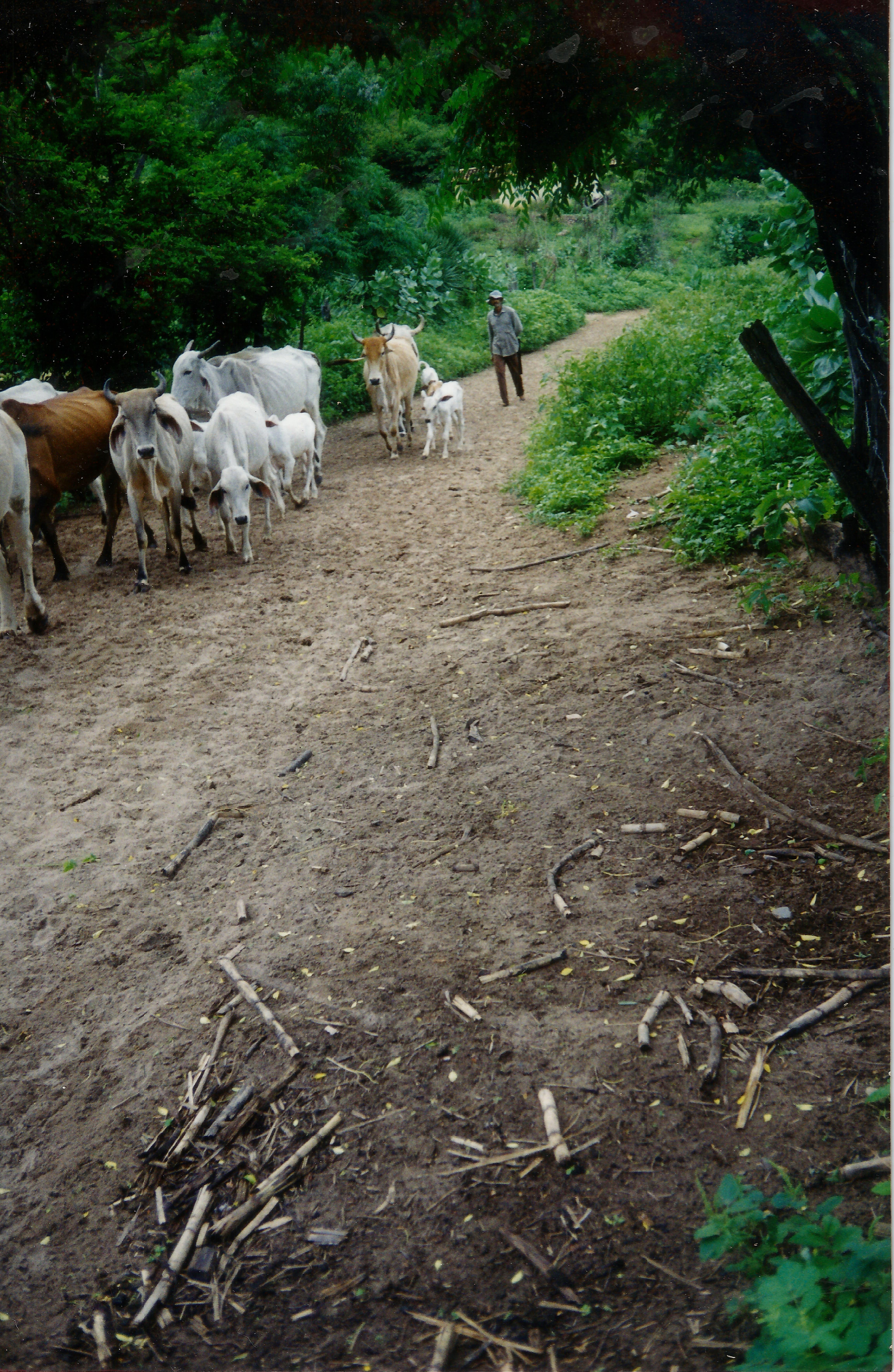 Homem conduz boiada na zona rural do município de Paratinga, em meados de 2003. A foto foi digitalizada por mim.